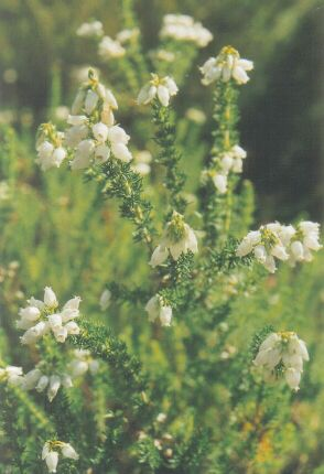 blühende Grauheide (Erica cinerea))